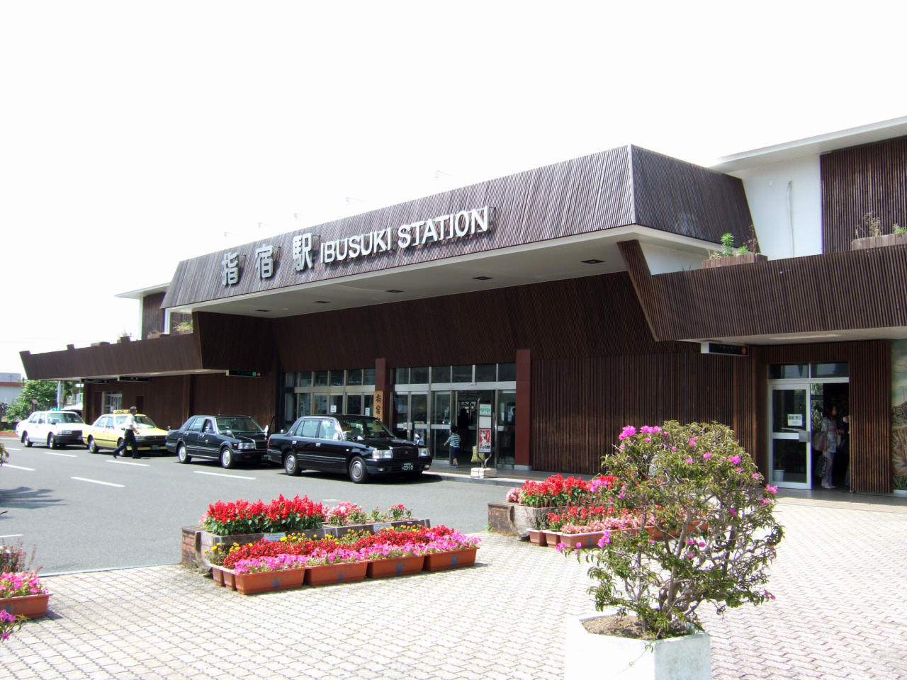 JR九州指宿駅 駅舎